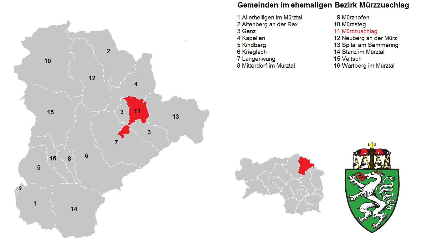 Bezirk MÃ¼rzzuschlag